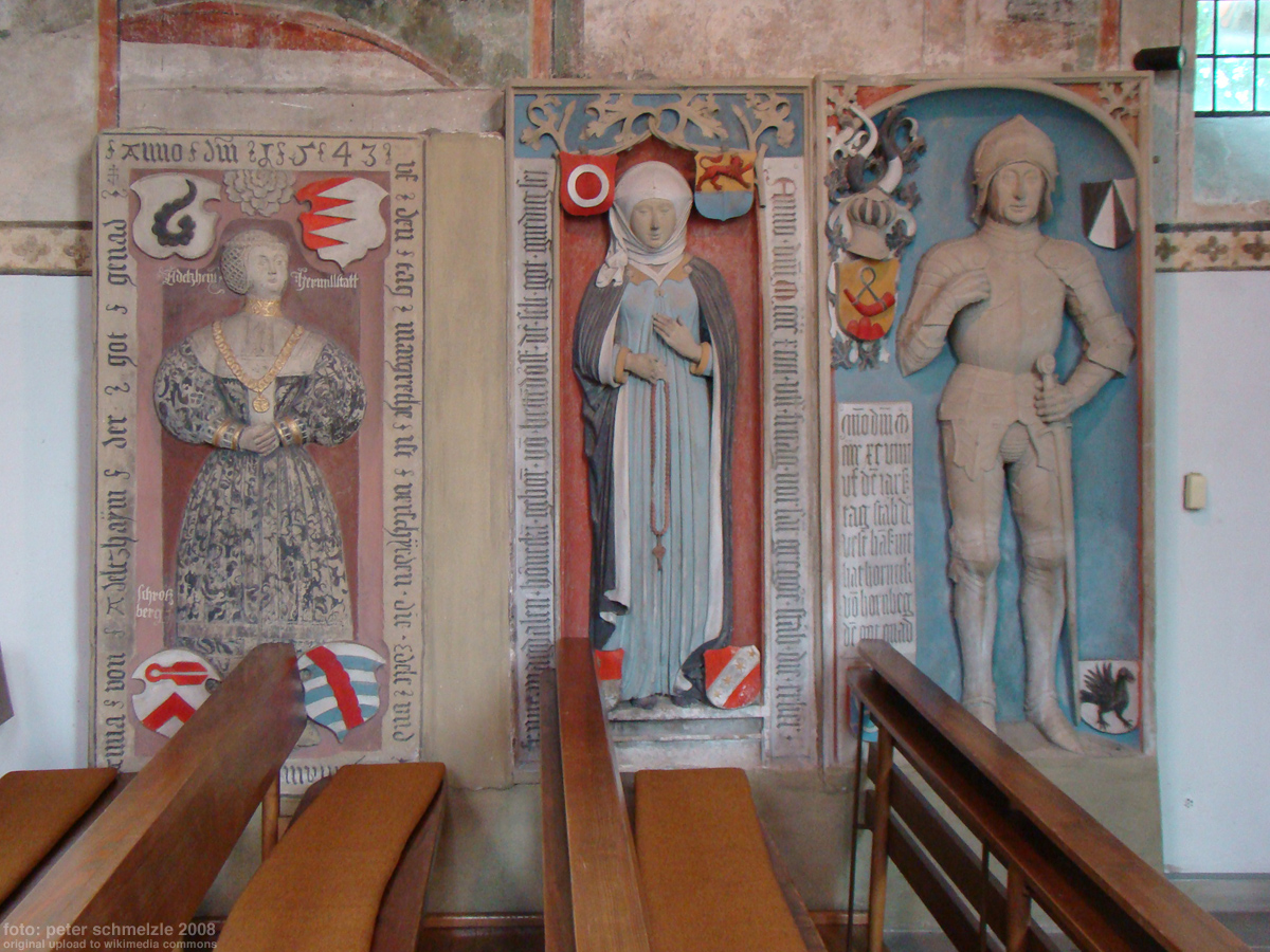 Historische Grabplatten in der Notburgakirche in Haßmersheim-Hochhausen